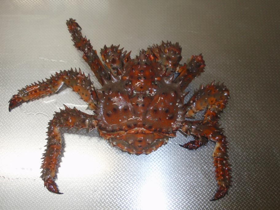 (2008年11月22日、本人撮影